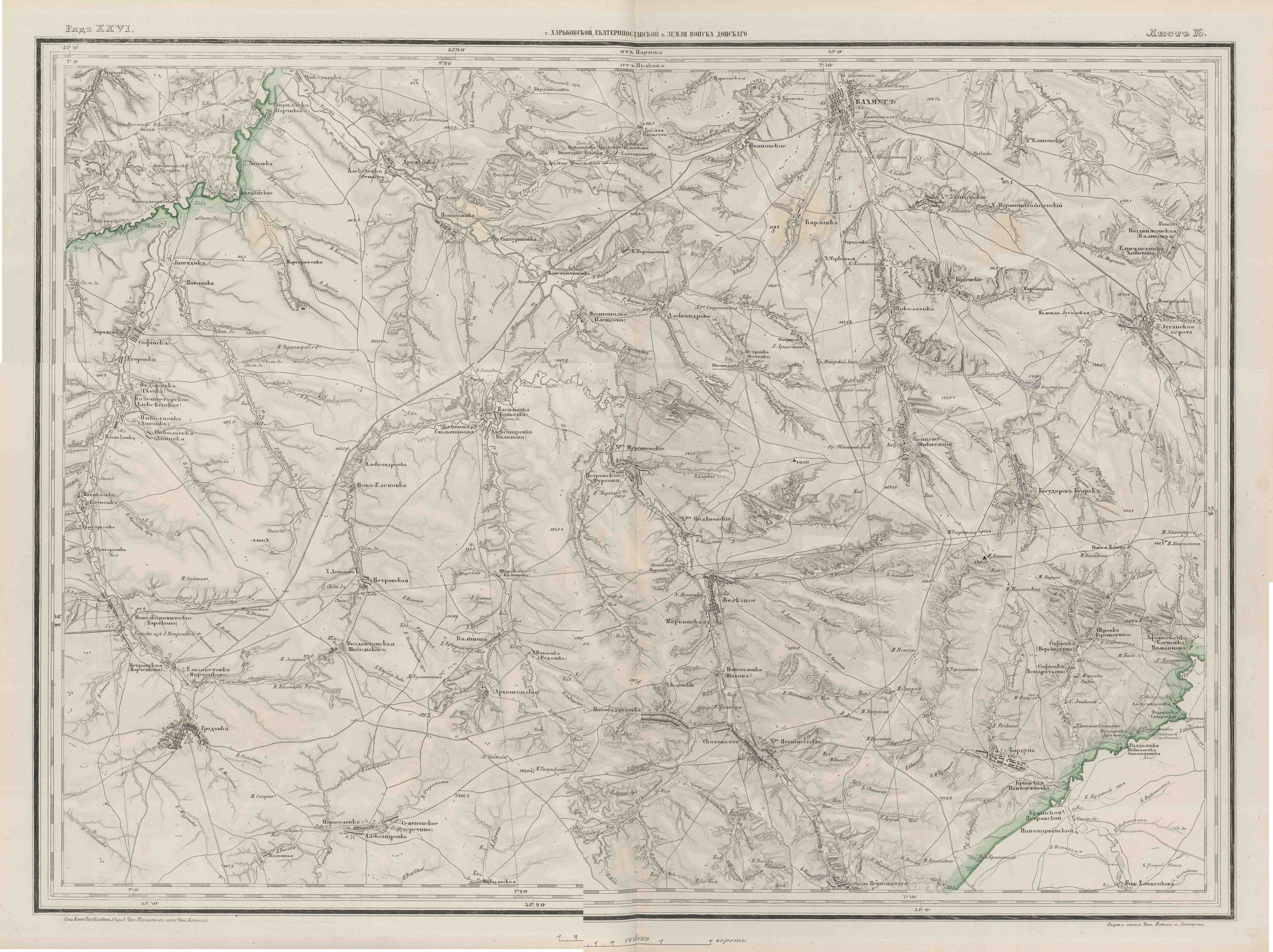 фото